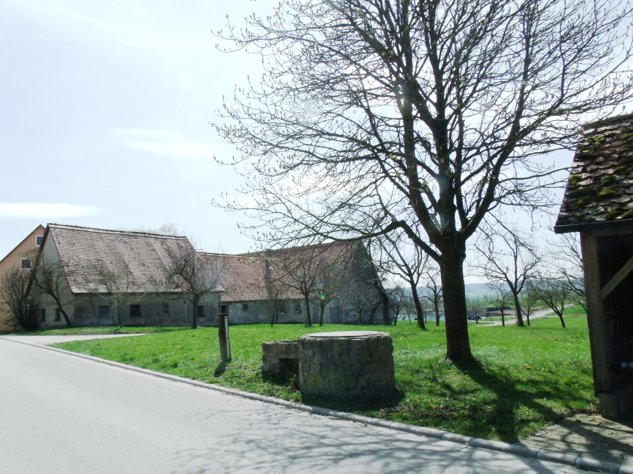 Waizendorf, Ortsteil von Leutershausen im Landkreis Ansbach